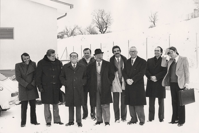 Il Prof. Fedi ed il suo gruppo di ricerca tra il Prof. Peroni ed il Prof. Koch nell’impianto sperimentale del Fucino per lo studio della radiopropagazione a frequenze superiori a 10 GHz